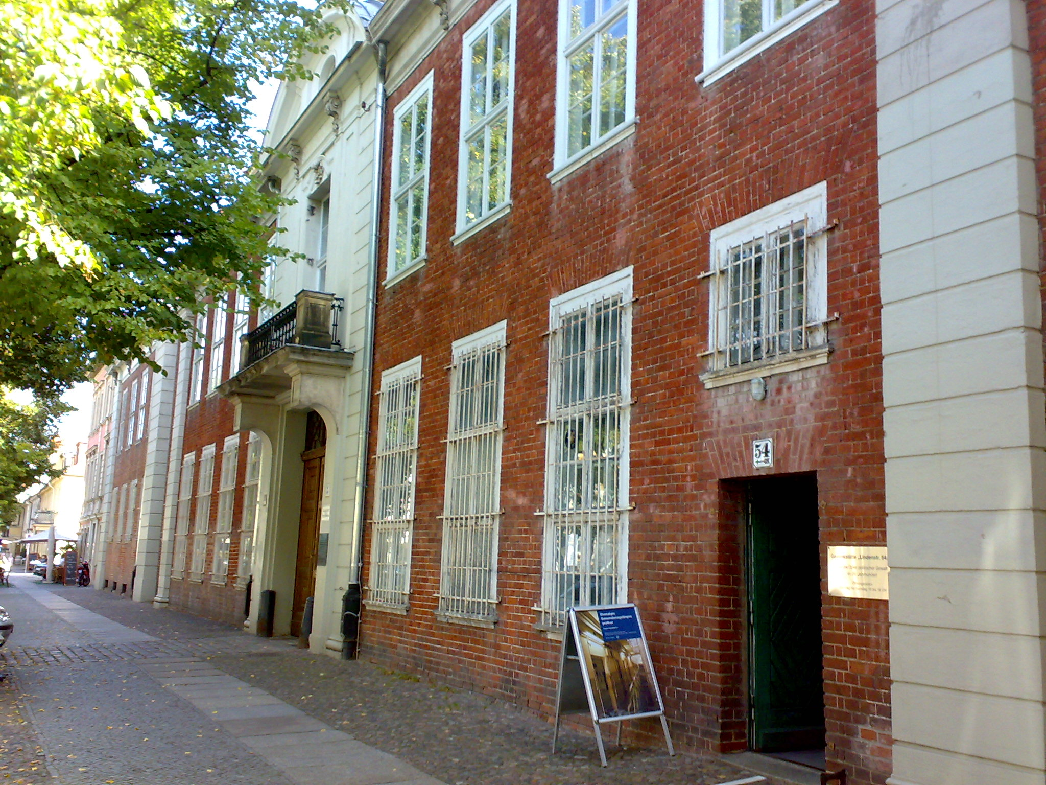 Die heutige Gedenkstätte Lindenstraße 54/55 in Potsdam (das sogenannte "Lindenhotel"), war in der Geschichte Gerichtsgebäude, Sitz eines NS-Erbgesundheitsgerichtes und in der Zeit des Nationalsozialismus, der sowjetischen Bestzungszeit und der DDR Untersuchungsgefängnis (ab 1953 der Stasi)